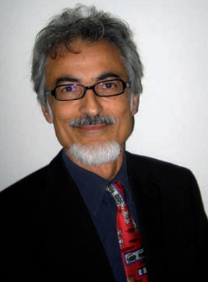 Mohsen Rezagholi, Dekan der Fakultät Informatik an der Hochschule Furtwangen im Jahr 2012